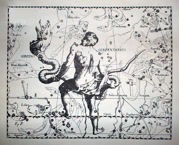 Tavola P del terzo volume "Firmamentum Sobiescianum, sive uranographia" dell'opera "Prodromus Astronomia" di Johannes Hevelius, pubblicato nel 1690 a Danzica. La tavola riproduce le costellazioni "Serpens et Serpentarius" dell'Emisfero Boreale.